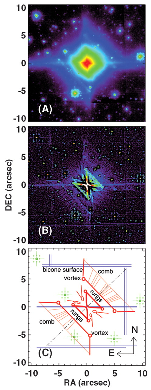 Images de la NASA de la nébuleuse du Carré rouge